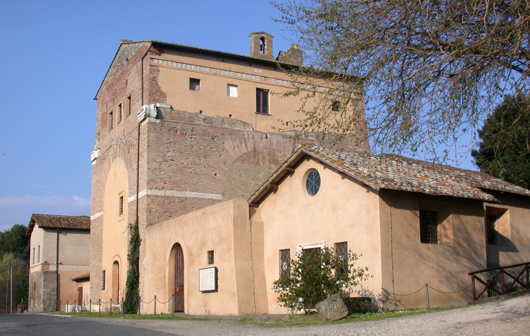 Italia, Regione Lazio, Provincia di Roma, via Flaminia, arco di Malborghetto e casale.